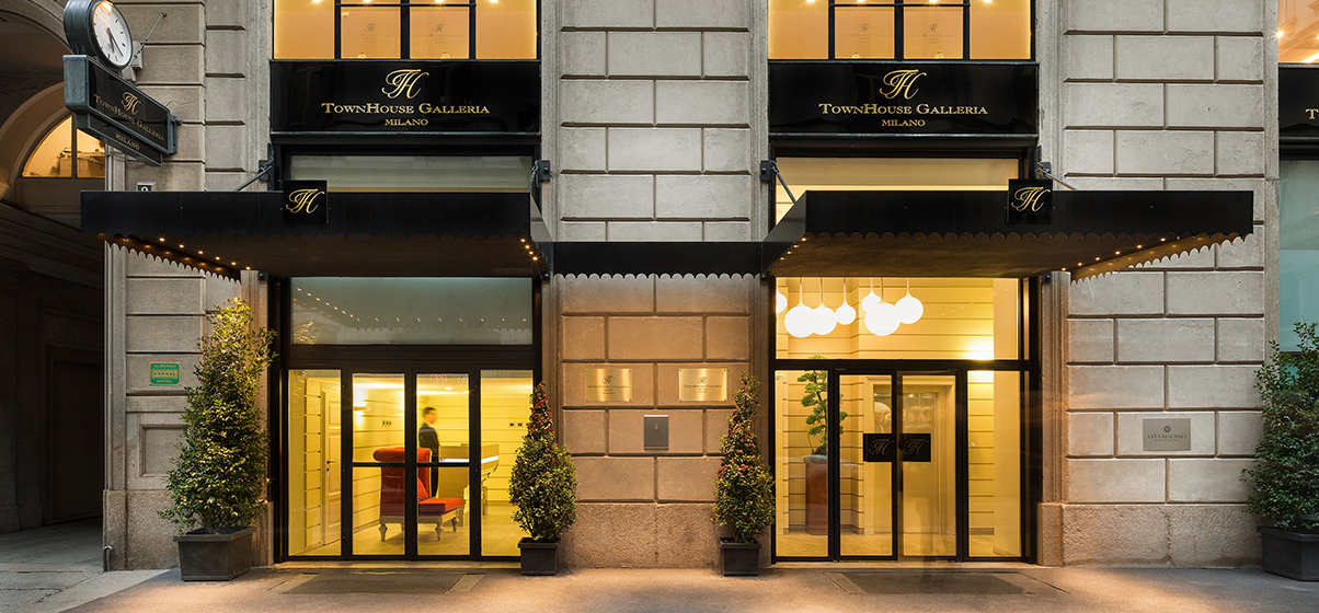 Nuova entrata dell'hotel TownHouse Galleria